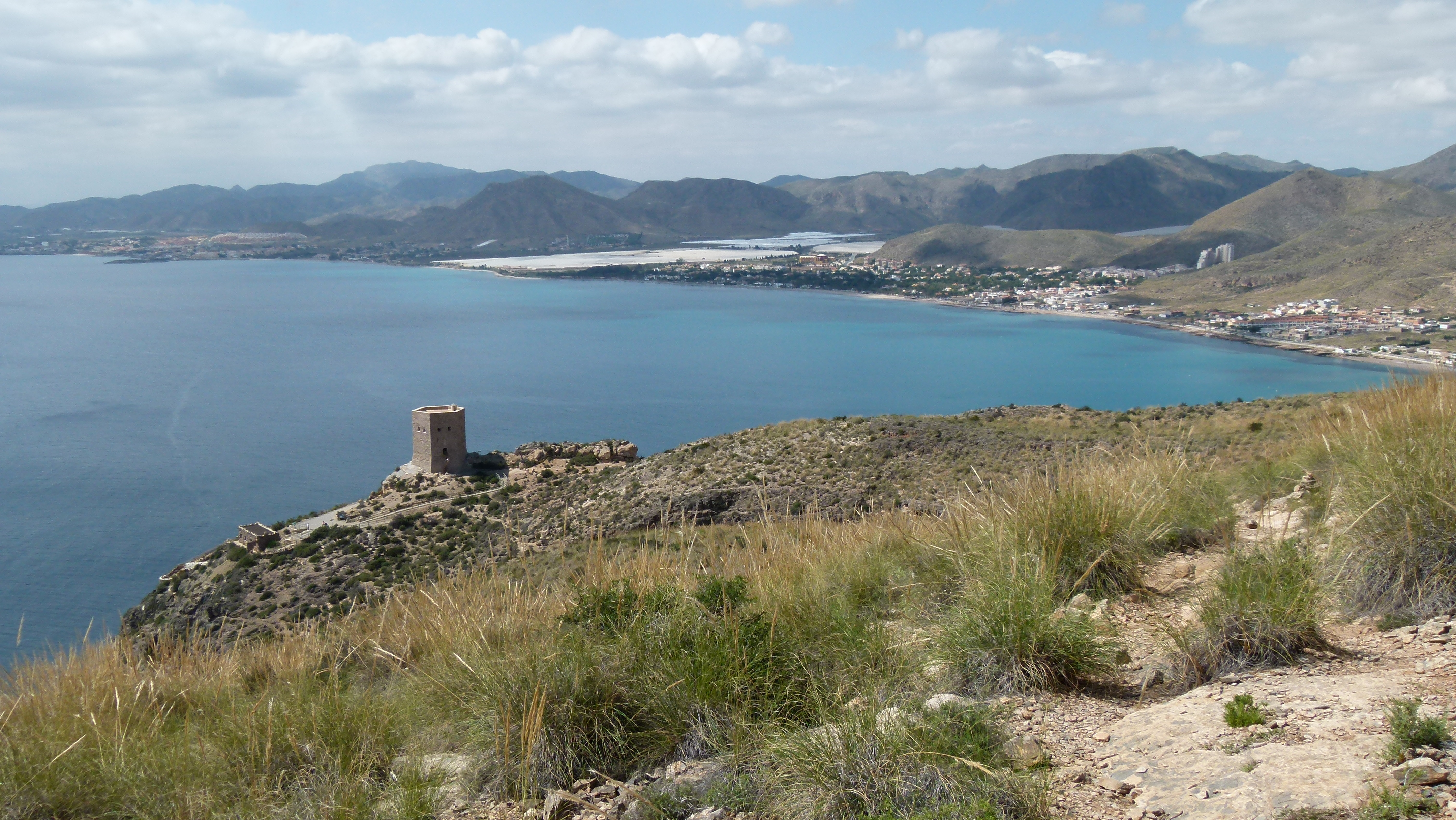 Torre de Santa Elena y La Azohía, Murcia, España